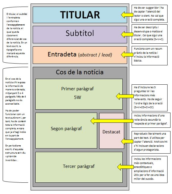 Quadre de l'estructura bàsica d'una notícia escrita en català